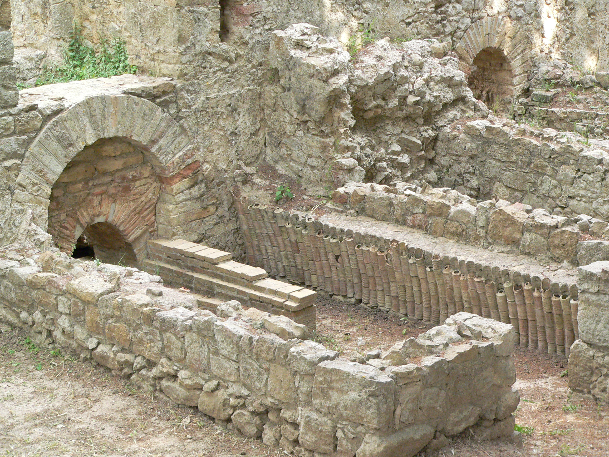 Villa del Casale a Piazza Armerina. M. Disdero Juin 2006